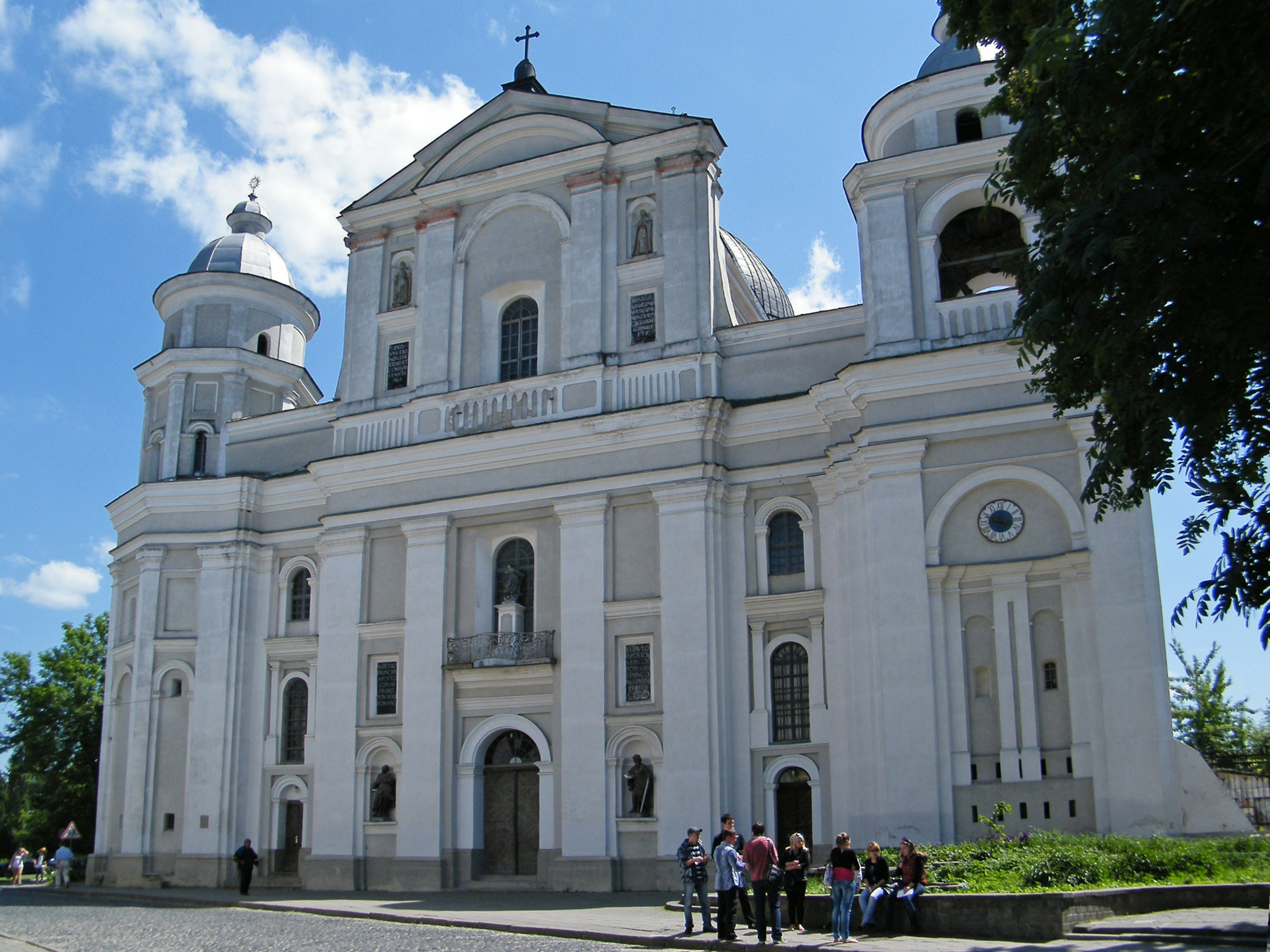 Собор Петра и Павла